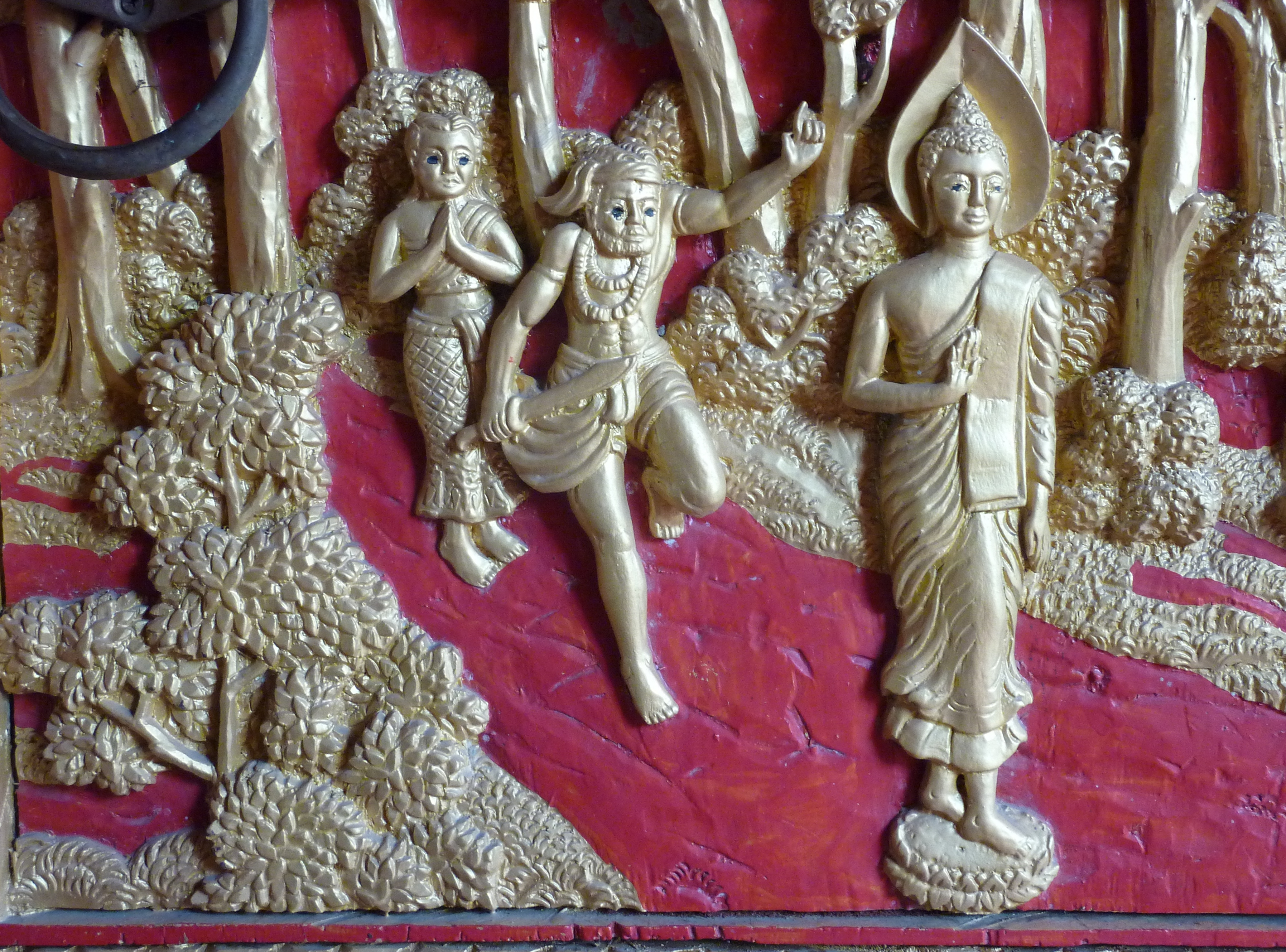 Wat Maisuwankiri